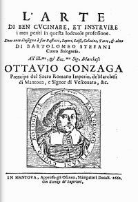 Frontespizio del volume: Bartolomeo Stefani, L'arte di ben cucinare et instruire i men periti in quella lodeuole professione, Mantova 1685.